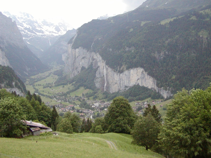 Lauterbrunnen